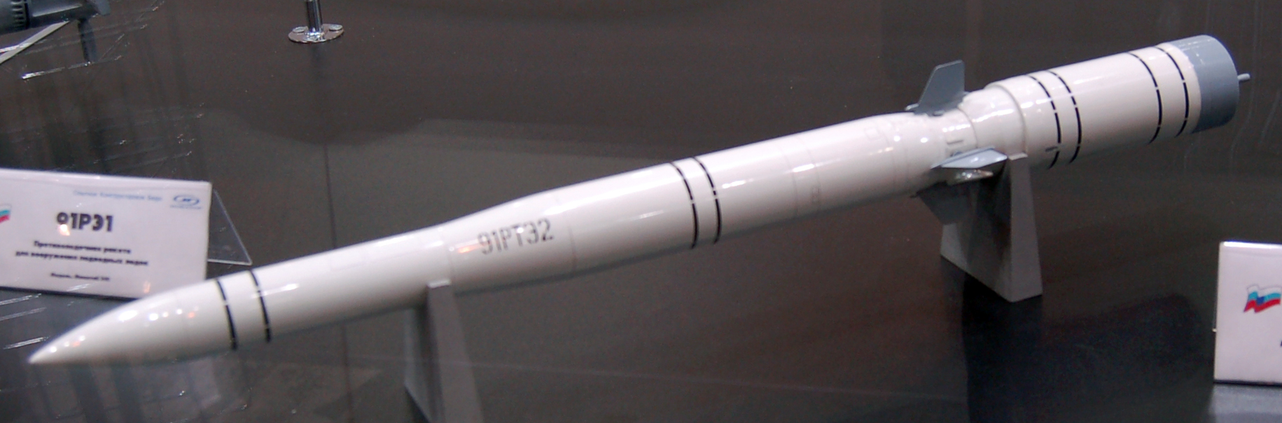 Макет противолодочной ракеты 91РТЭ2 на МАКС-2009